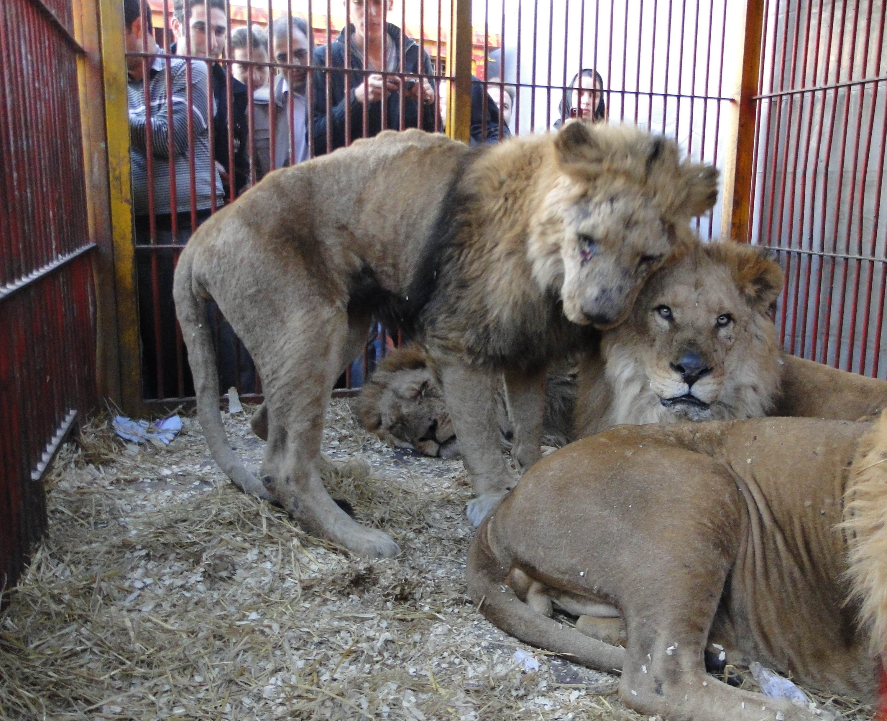 A wounded lion in Ahvaz Zoo.